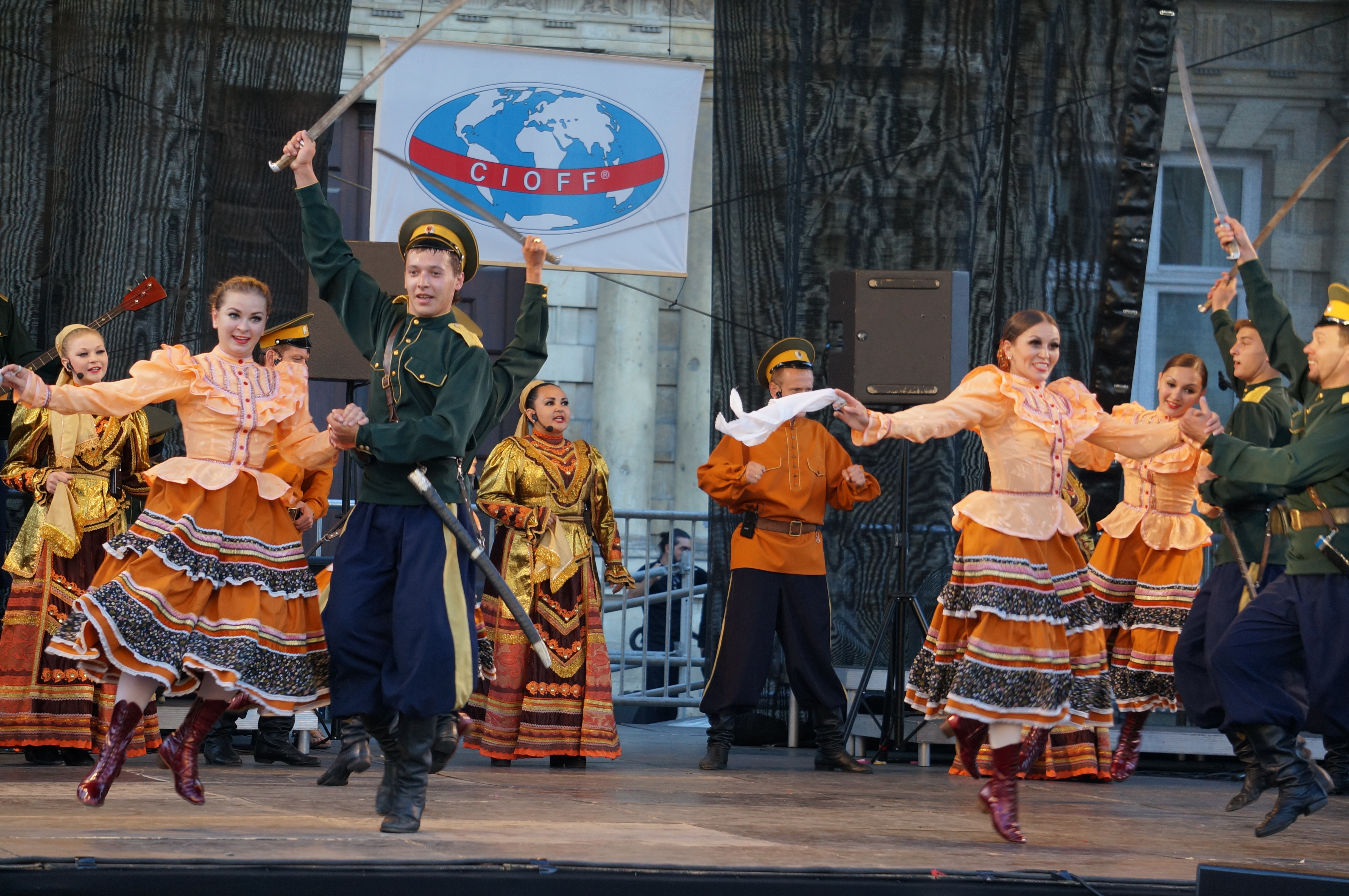 Troupe de Tchita lors de Sacre du folklore en 2014.